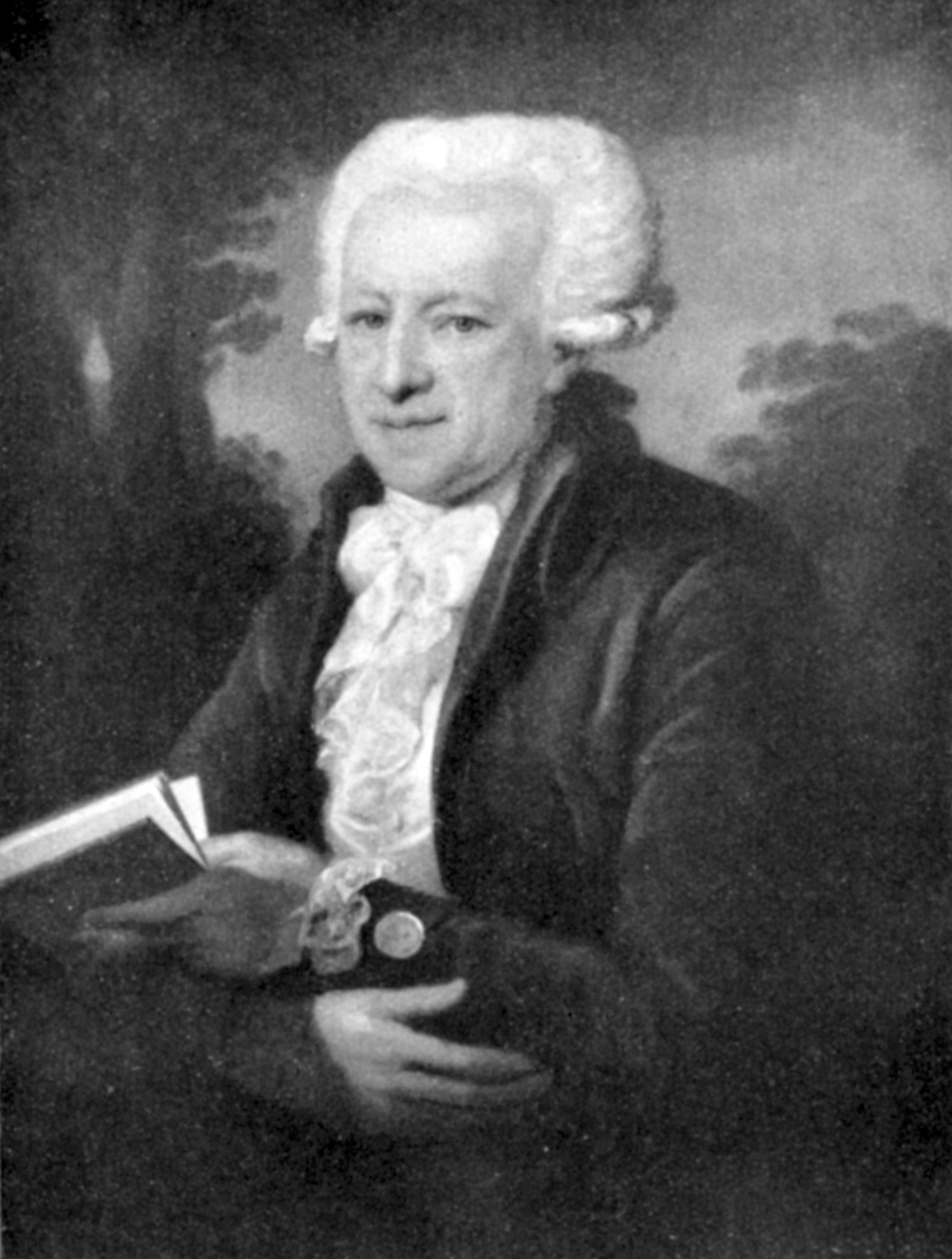 Leopold Reichsgraf von Neiperg (1728–92)